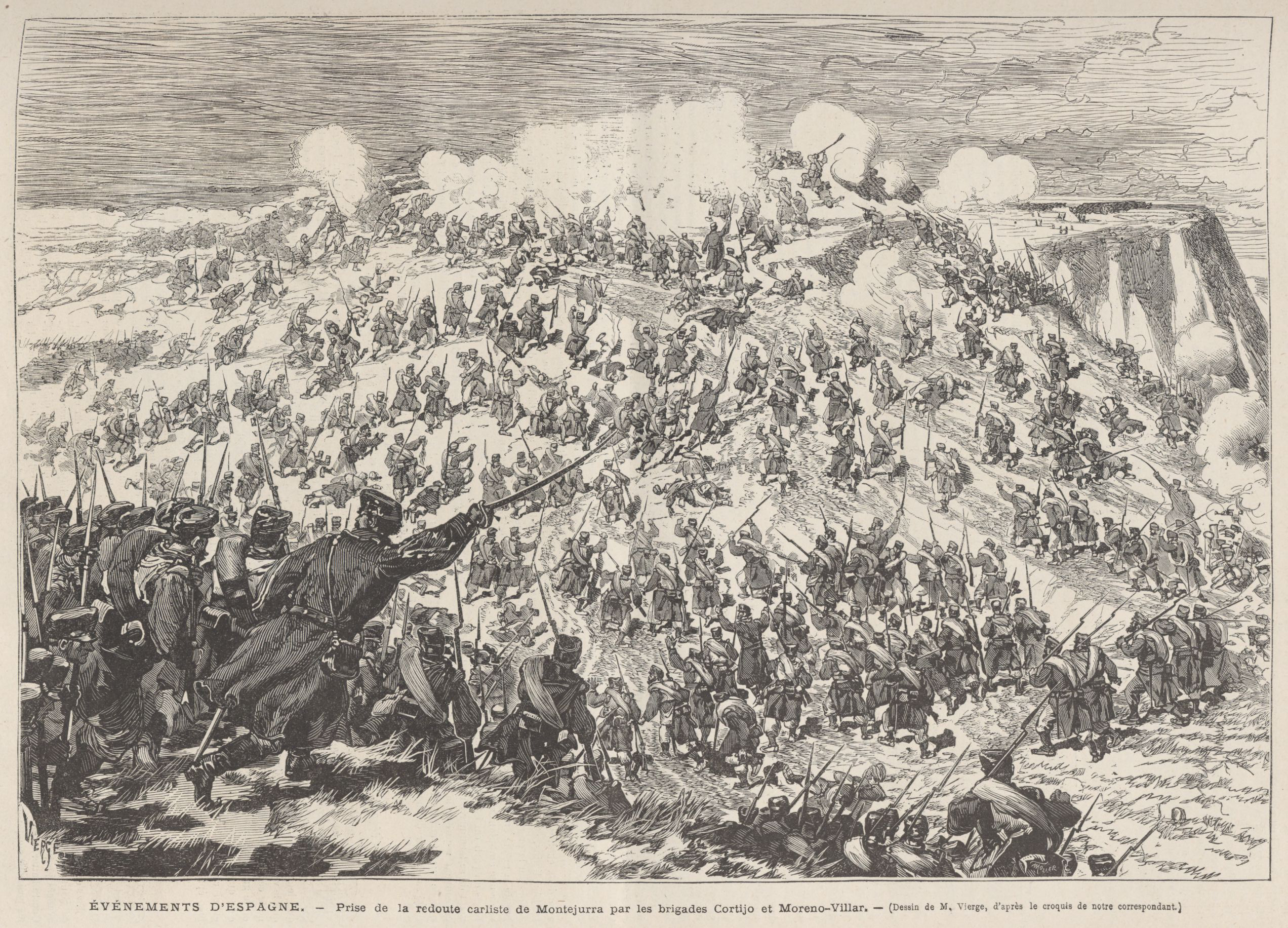 Événements d'Espagne. — Prise de la redoute carliste de Montejurra par les brigades Cortijo et Moreno-Villar. — (Dessin de M. Vierge, d'après le croquis de notre correspondant spécial).